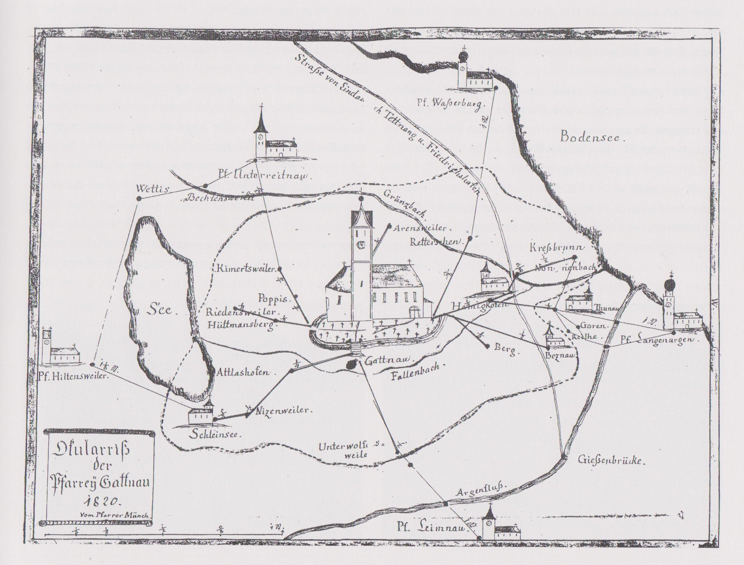 Deutschland - Baden-Württemberg - Bodenseekries - Kressbronn am Bodensee - Ortsteil Gattnau: Okularriss der Pfarrei Gattnau, 1820